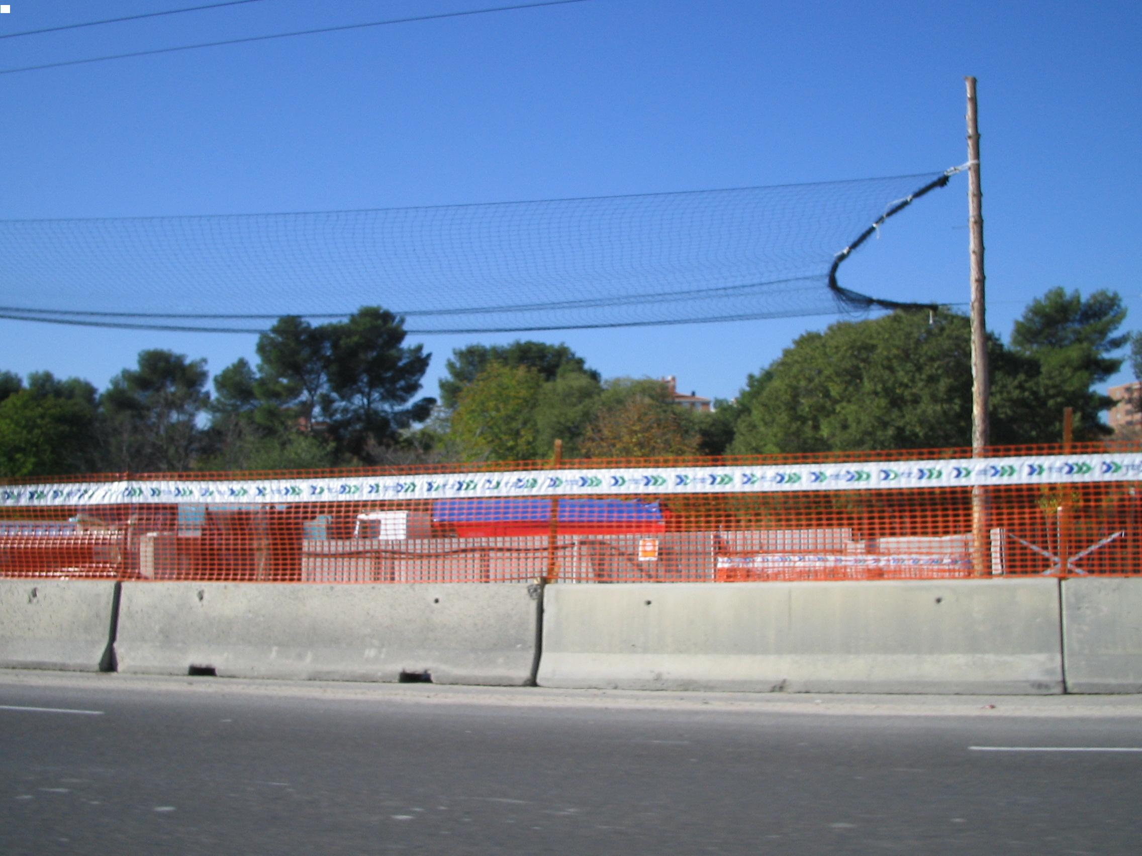 Estación de Metro de el Cruce de Villaverde...